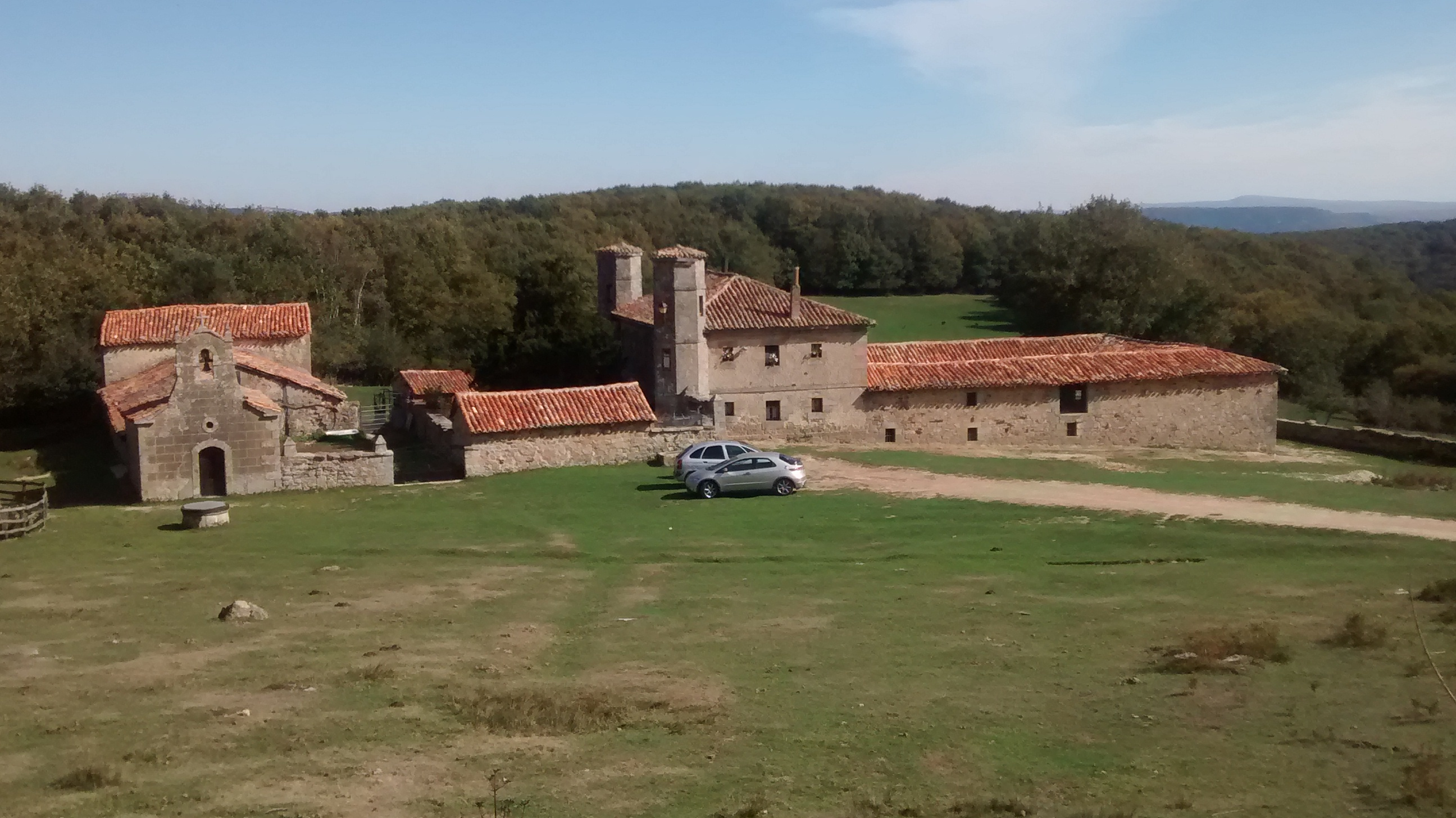 Cabaña de Hijedo, palacete de estilo regionalista de principios del siglo XX situado en un claro del monte Hijedo (Burgos, España).